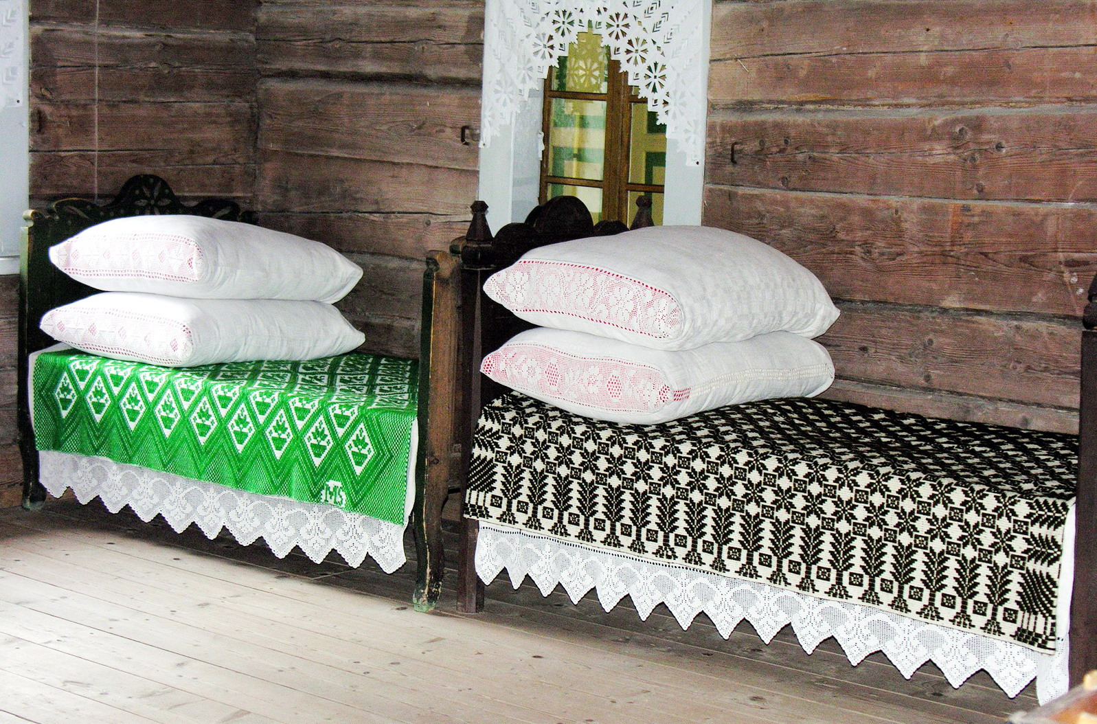 Lova 2007-04-21, Lietuva